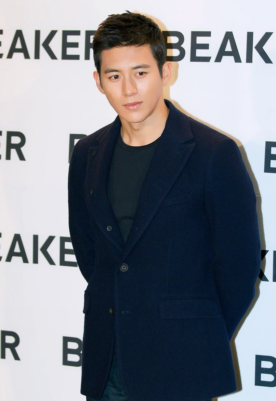 121025-비이커-론칭파티고수